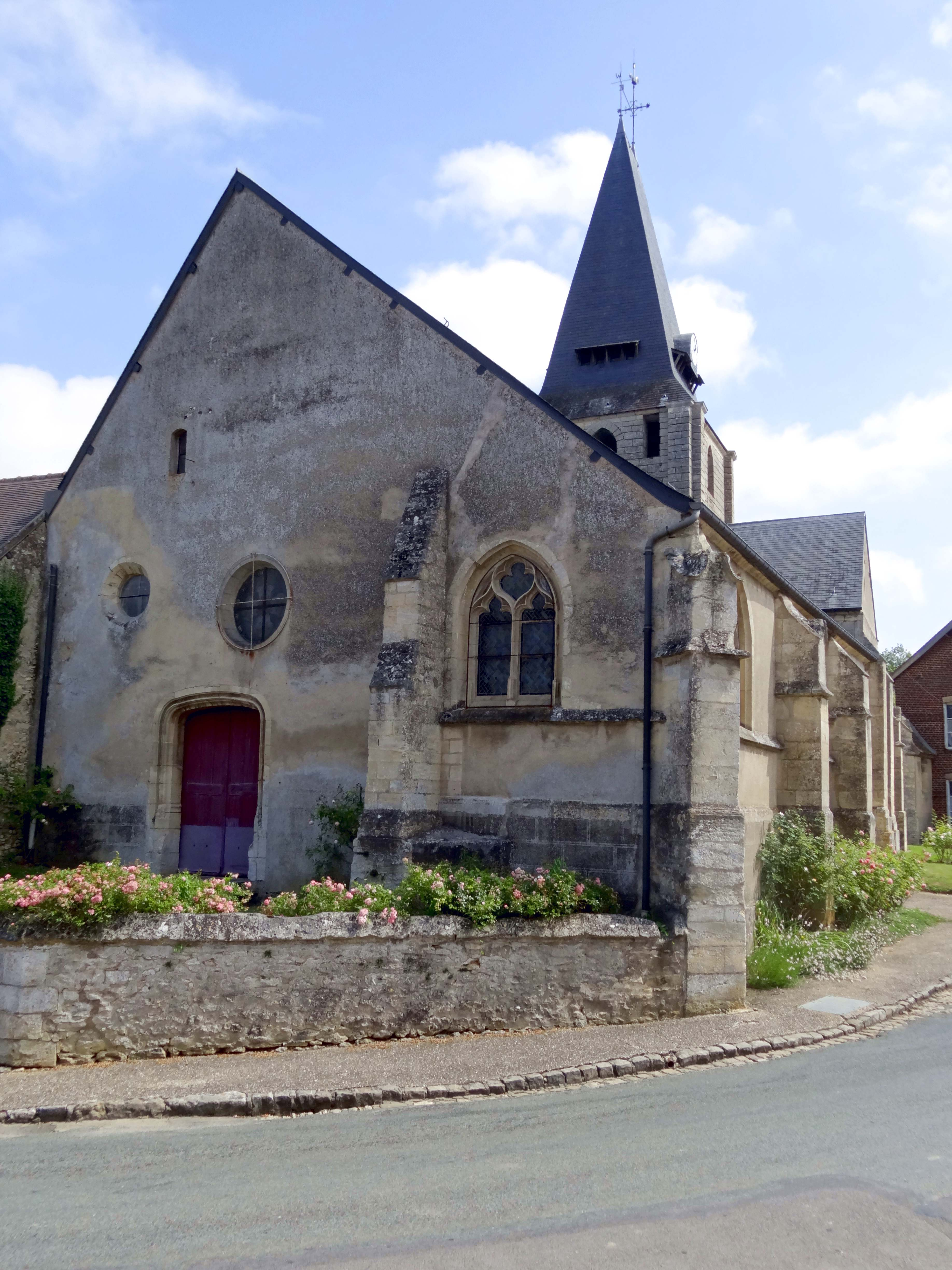 Église Saint-Germain de Boury-en-Vexin - voir titre.